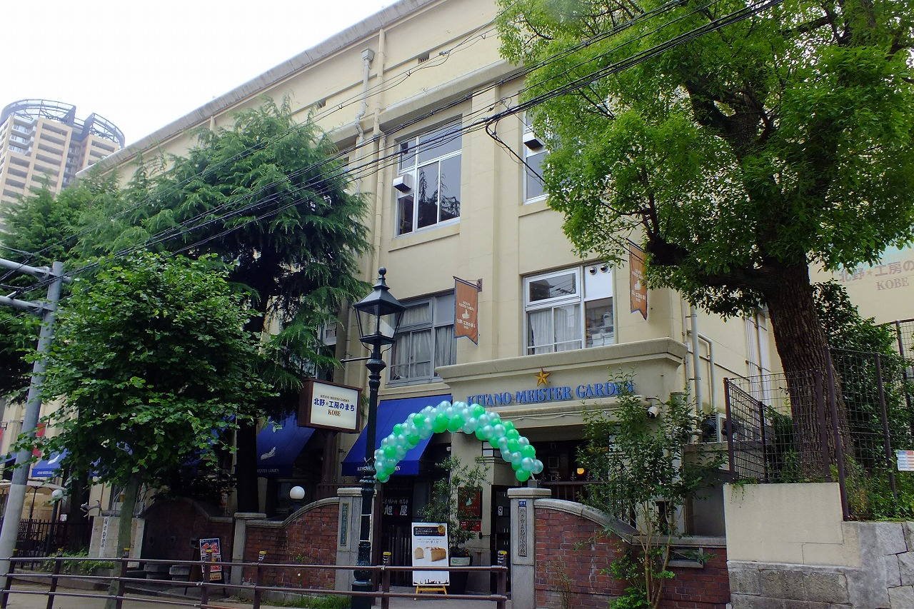 北野工房の町、KOBE KITANO MEISTER GARDEN2